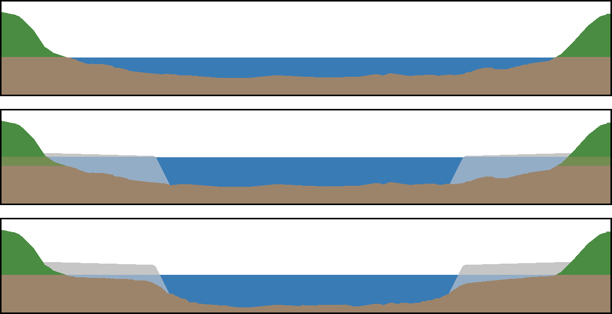 Veränderung eines natürlichen Flussbettes durch die Errichtung von Flussbuhnen